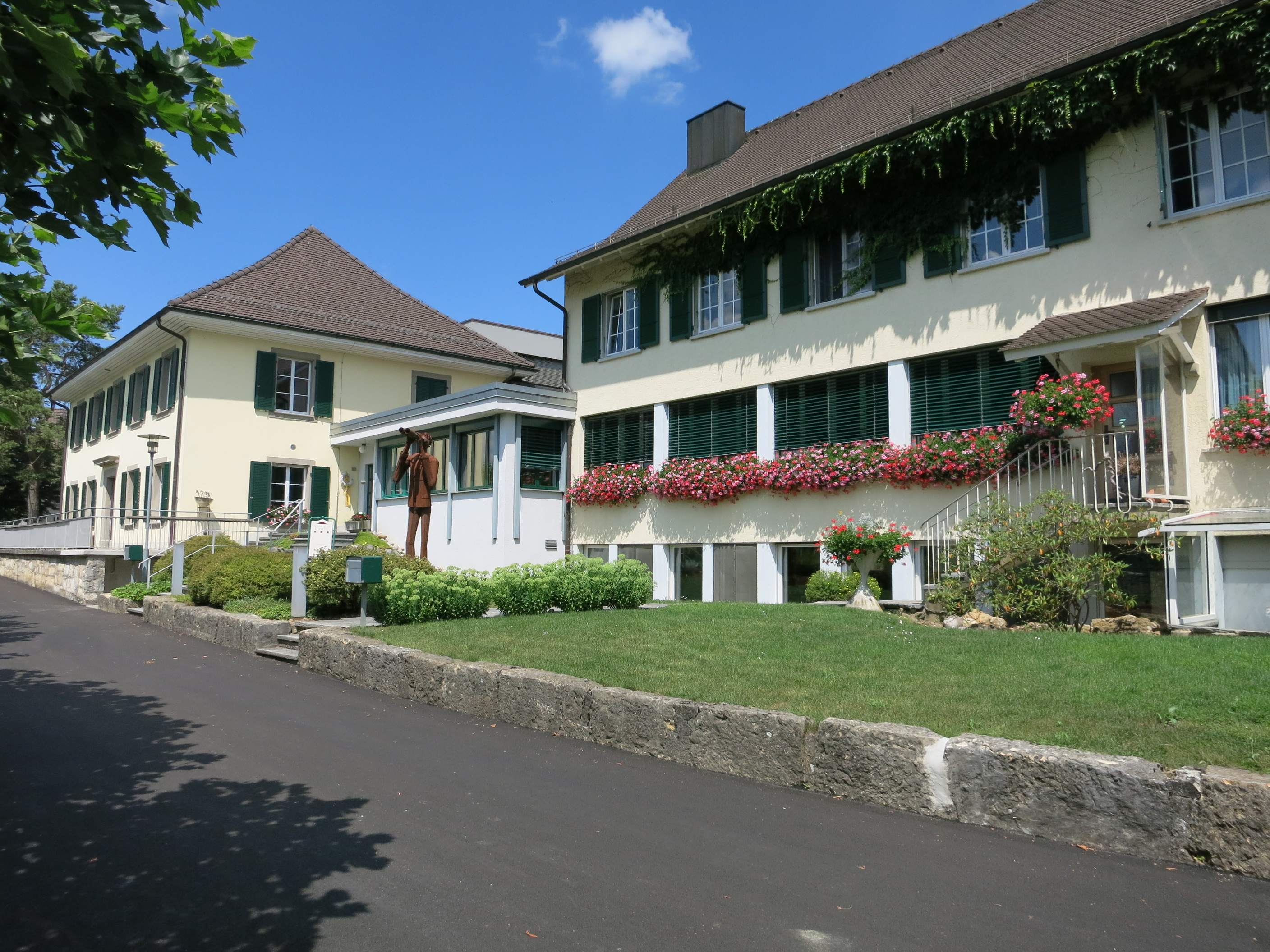 Schulheim, Effingen AG, Schweiz